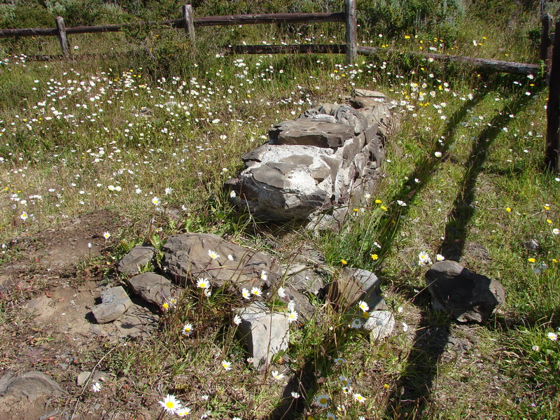 restos de la iglesia de la ciudad del Rey Felipe mas tarde denominado Puerto del Hambre